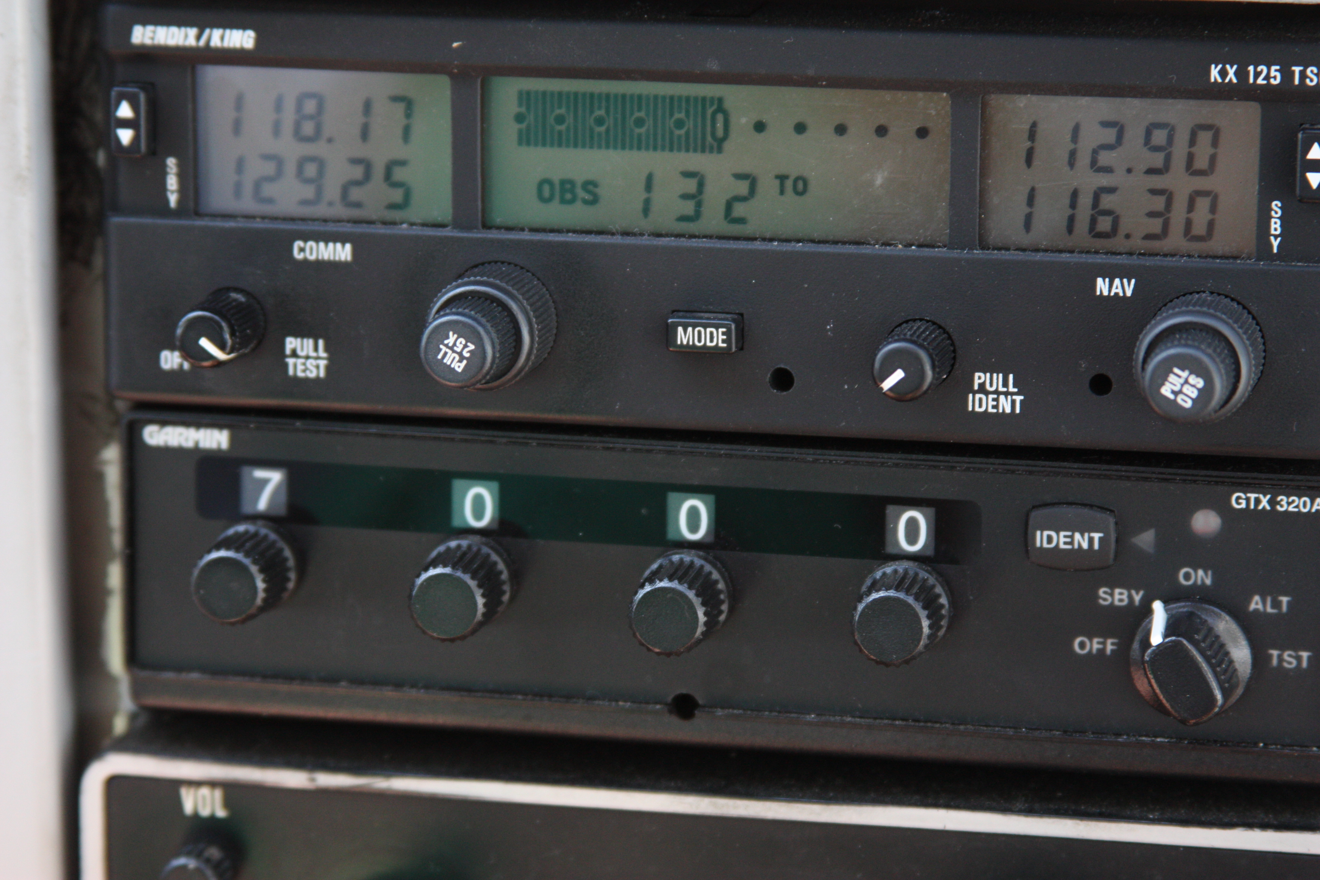 Instrumente im Cockpit einer Cessna C172; Juli 2010